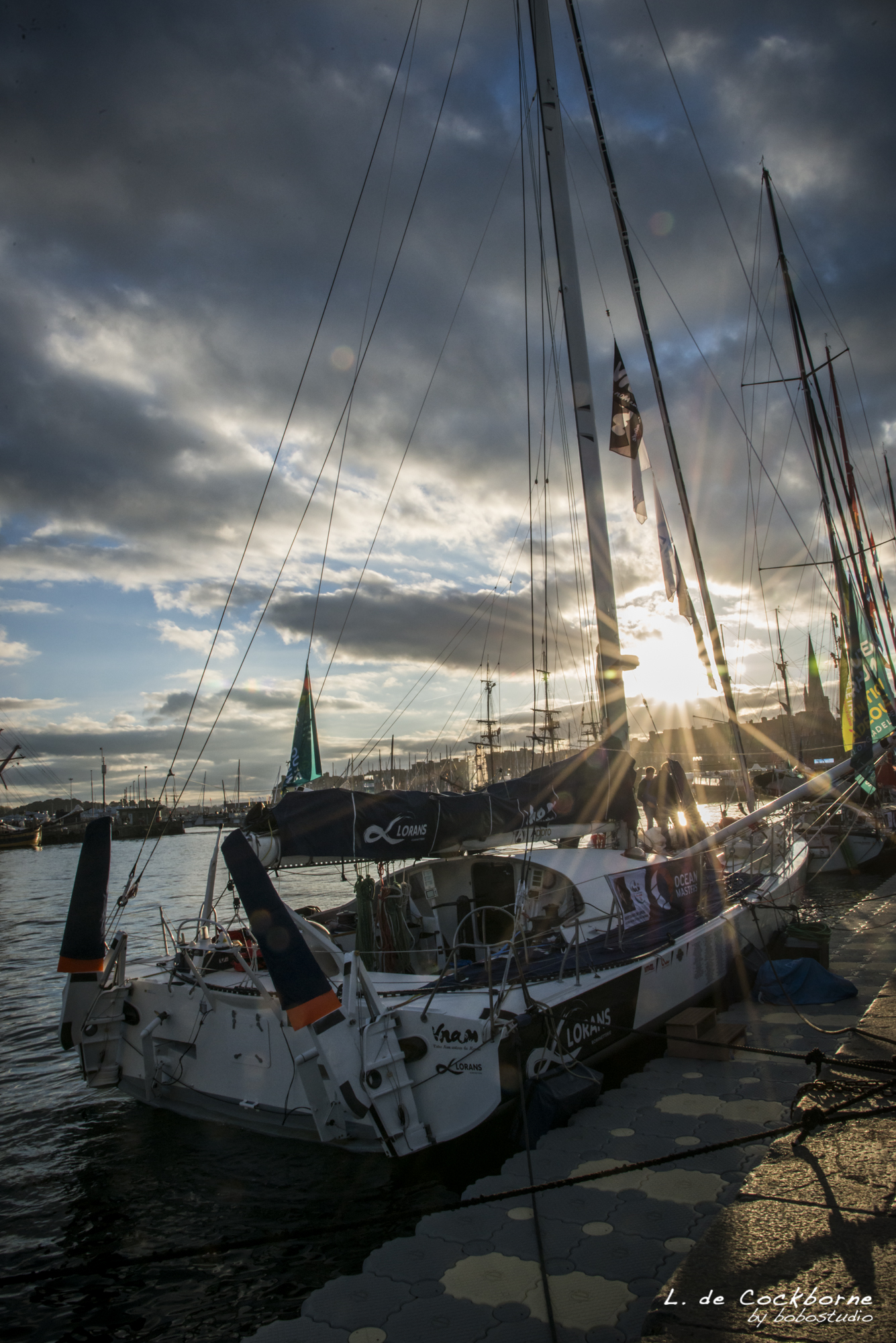 route_du_rhum_2014-262